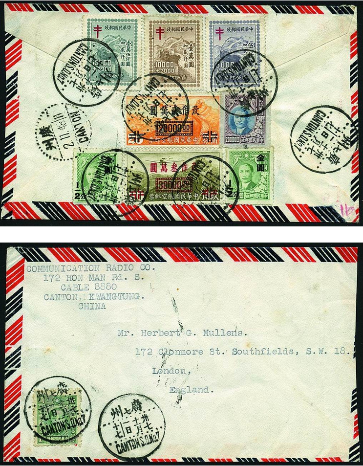 由廣東省城廣州漢民路寄往英國倫敦的信件，其中漢民南路（現北京南路）以粵音拼寫「Hon Man Rd. S.」。1948年11月1日由廣州寄英國航空封，混貼全套防癆附捐票、國幣票與金圓票，防癆票自然實寄封較少，混貼金圓票者尤罕。封上正反面均銷廣州第7支局中英文「CANTON .7」三格式日戳。由集郵愛好者延陵牧星收藏。